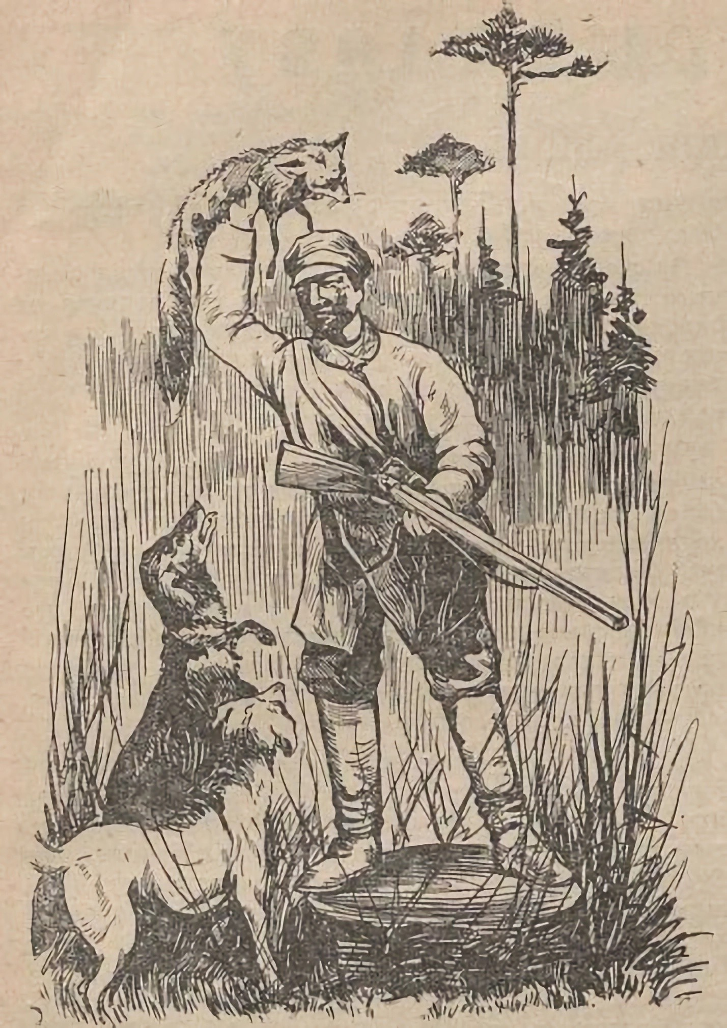 Ілюстрацыя Г. Змудзінскага да апавядання М. Цэлеша "Людзі, зверы, птахі", надрукаванага ў часопісе "Паляўнічы Беларусі", № 3 за 1930